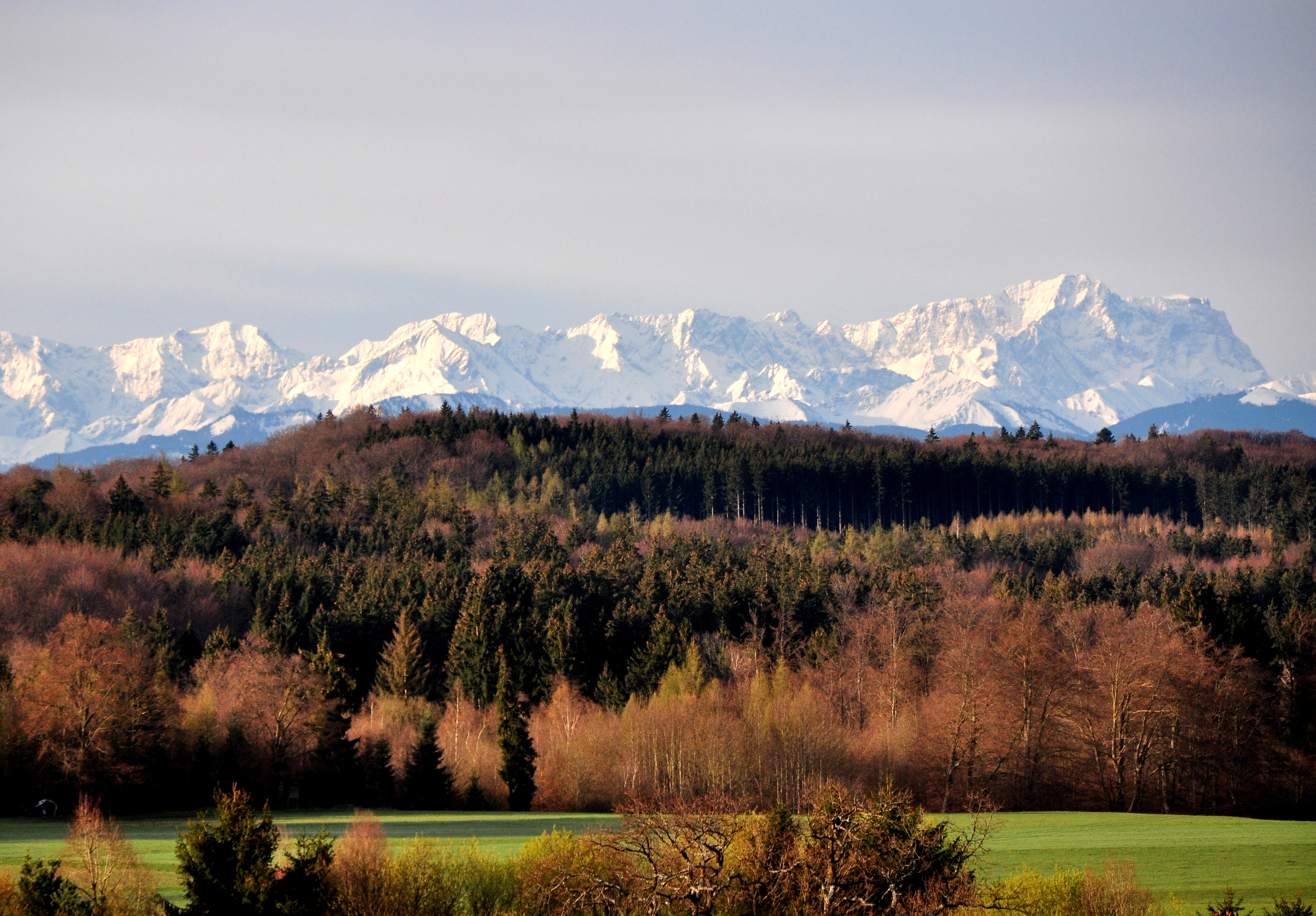 Landschaft im Endmoränenzug westlich des Starnberger Sees. Im Hintergrund das Wettersteingebirge mit der Zugspitze (im Bild ganz rechts). Landschaftsschutzgebiet „Westlicher Teil des Landkreises Starnberg“.